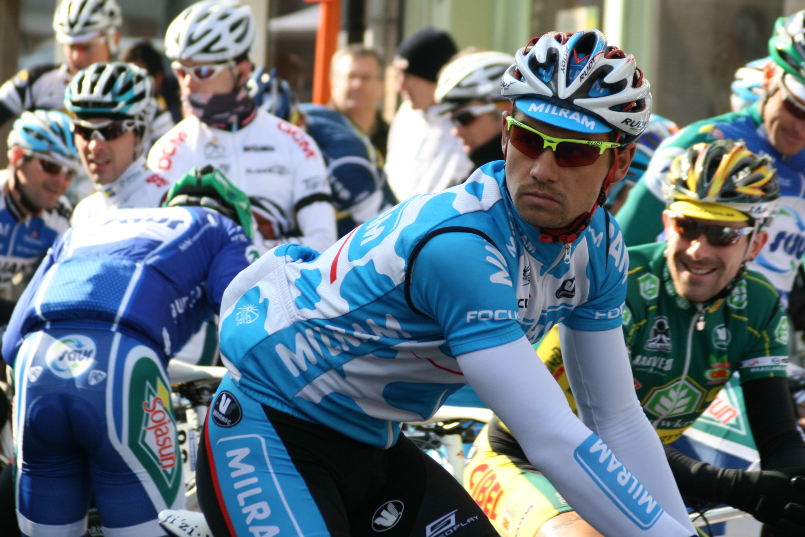 Paul Voss lors des Trois jours de Flandre occidentale 2010